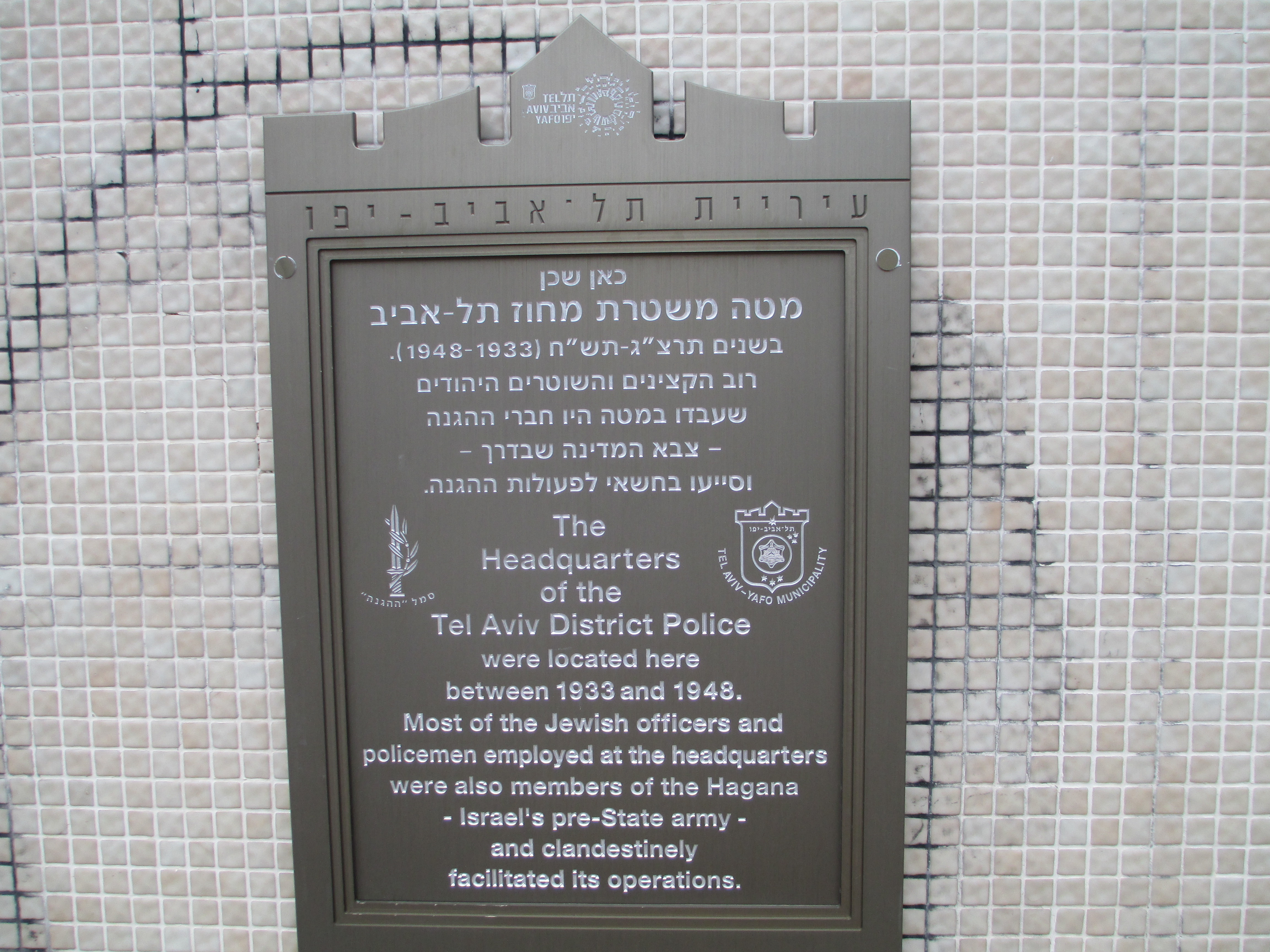 לוחית זיכרון למטה משטרת מחוז תל אביב המנדטורית ברח' השחר 5 בתל אביב